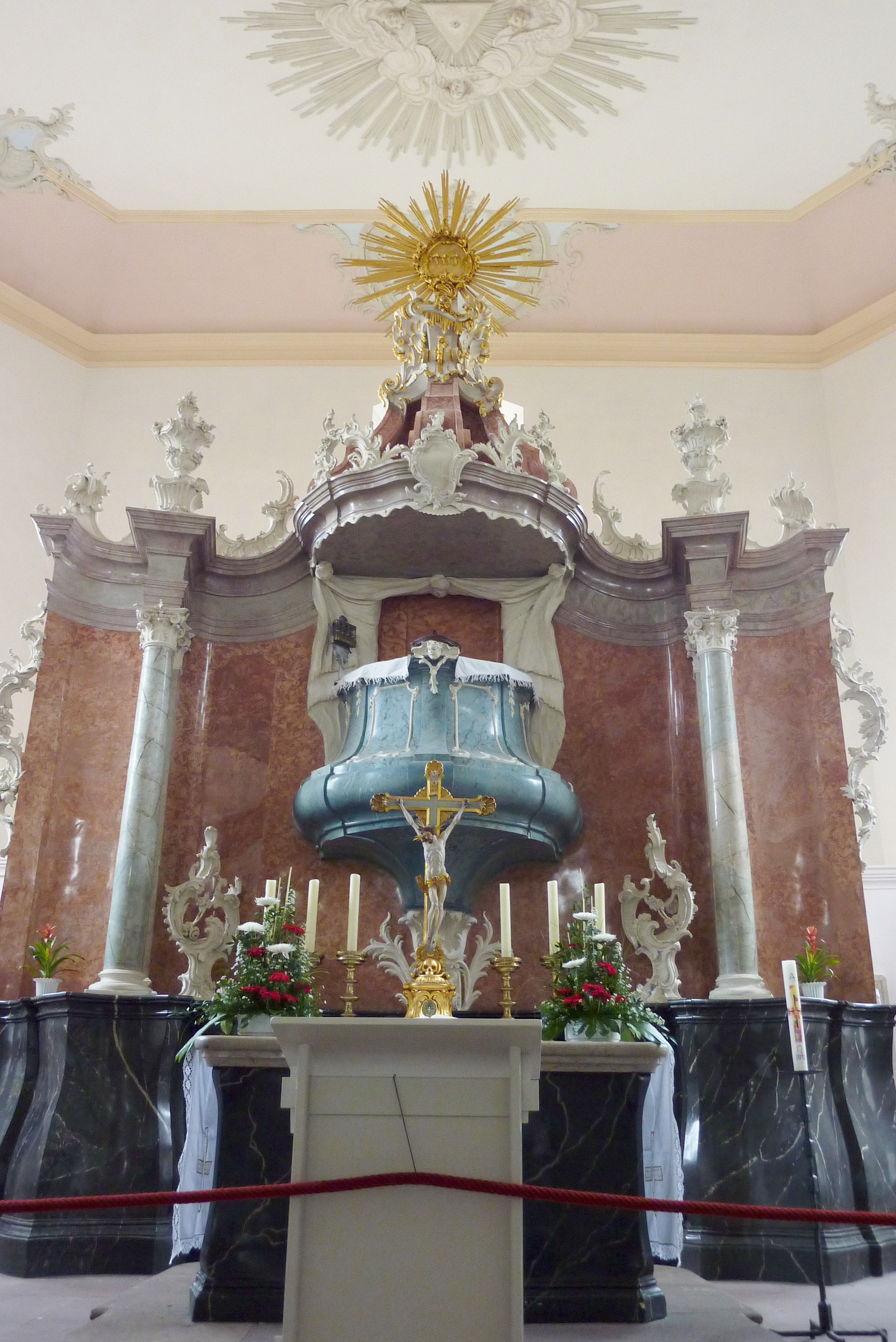 Evangelische Stadtkirche in Lauterbach (Hessen), Marktplatz 10, Kanzelwand mit Altar